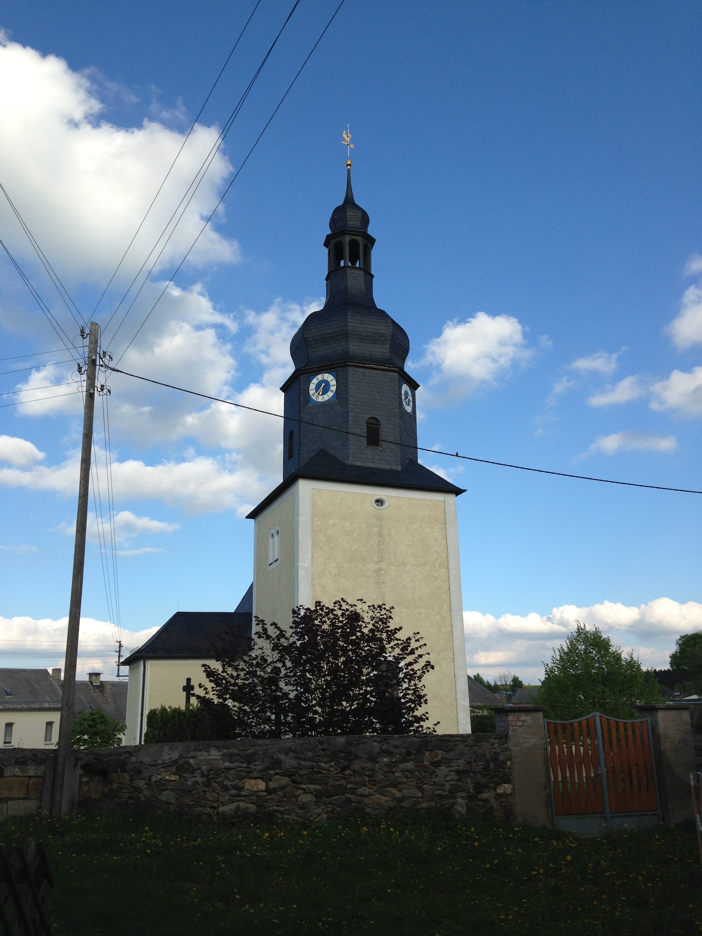 Die Dorfkirche von Unterkoskau